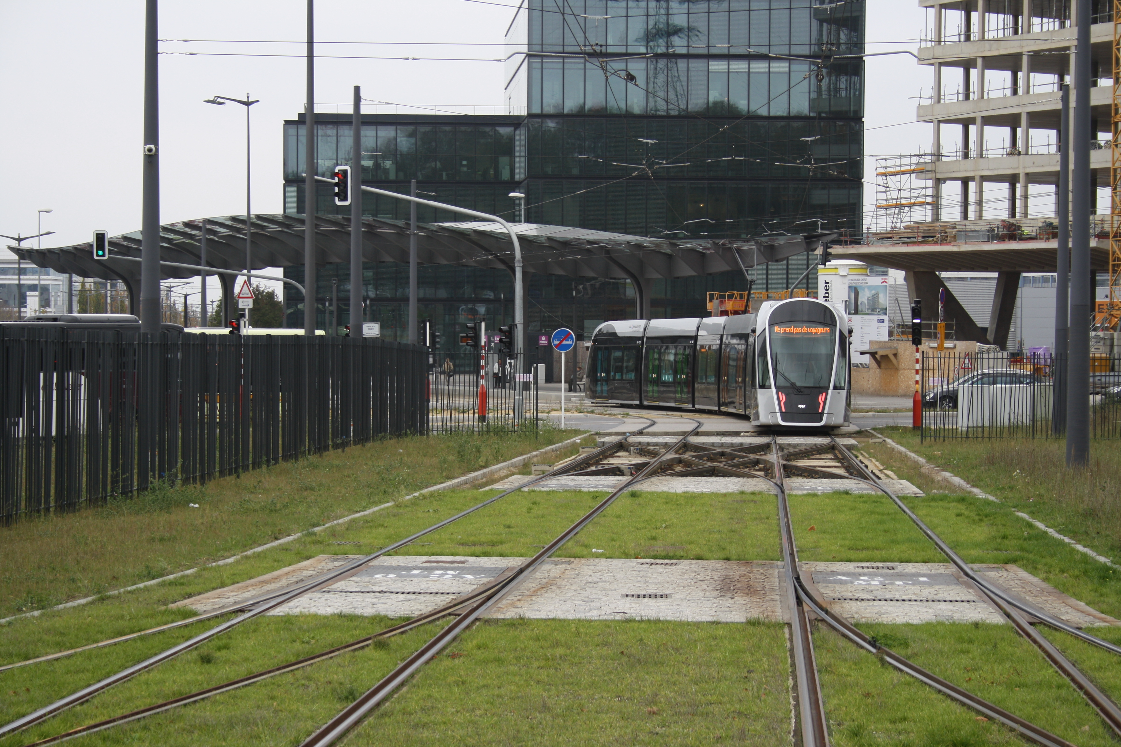 Doppelte Gleisverbindung südwestlich der östlichen Wendestelle der Stater Tram in Luxemburg, im Hintergrund die Station Luxexpo